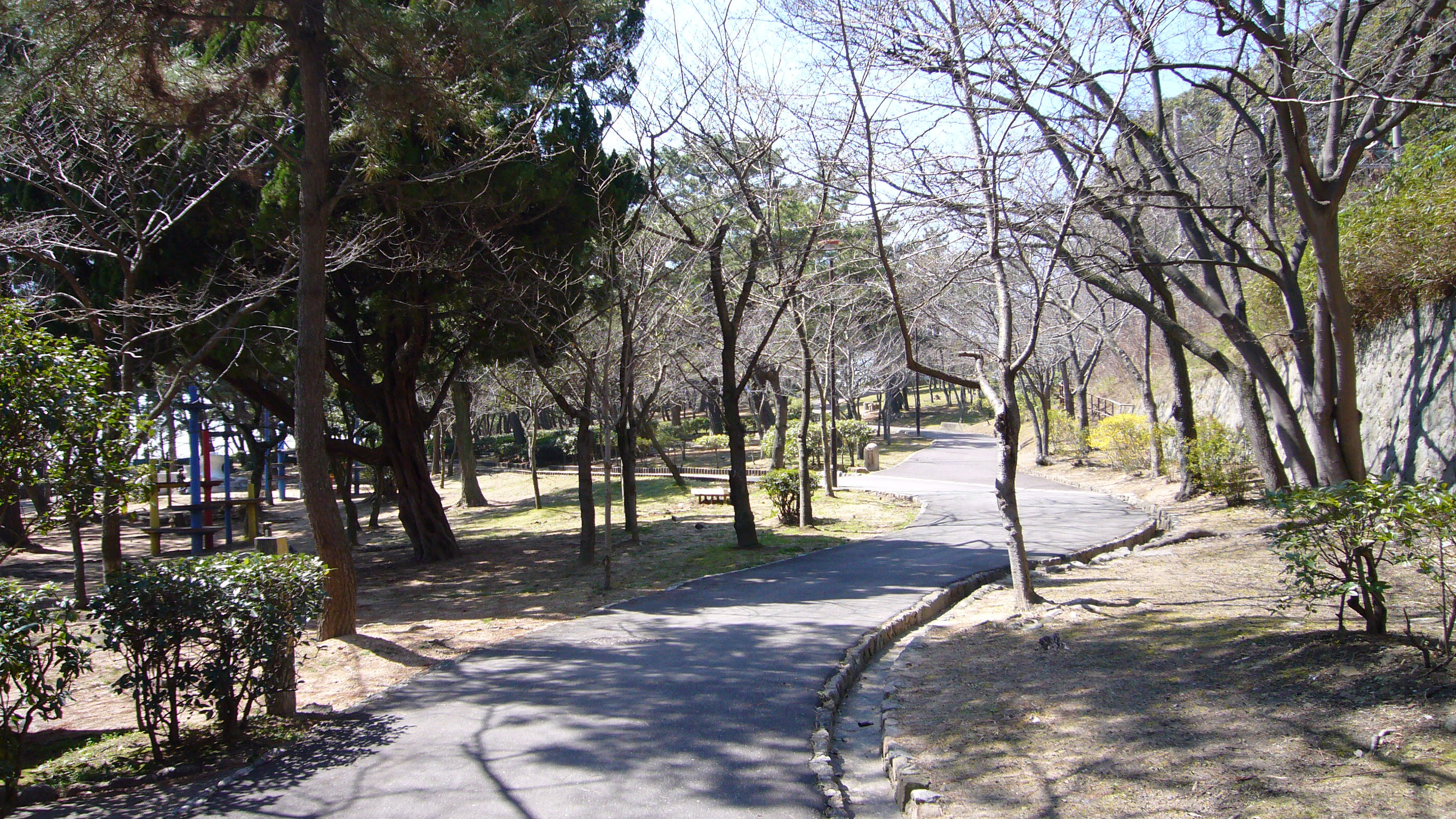 Sumaura Park in Kobe, Japan